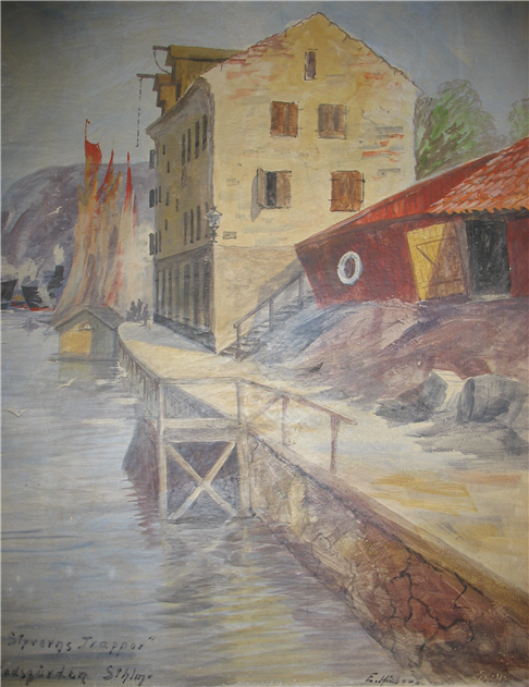 Fresk av Einar Hillberg föreställande Sista styverns trappor i Stockholm. En av de fresker som Einar Hillberg målade i sin sons, Ove Hillbergs, nybyggda hus i Eskiltuna 1953.